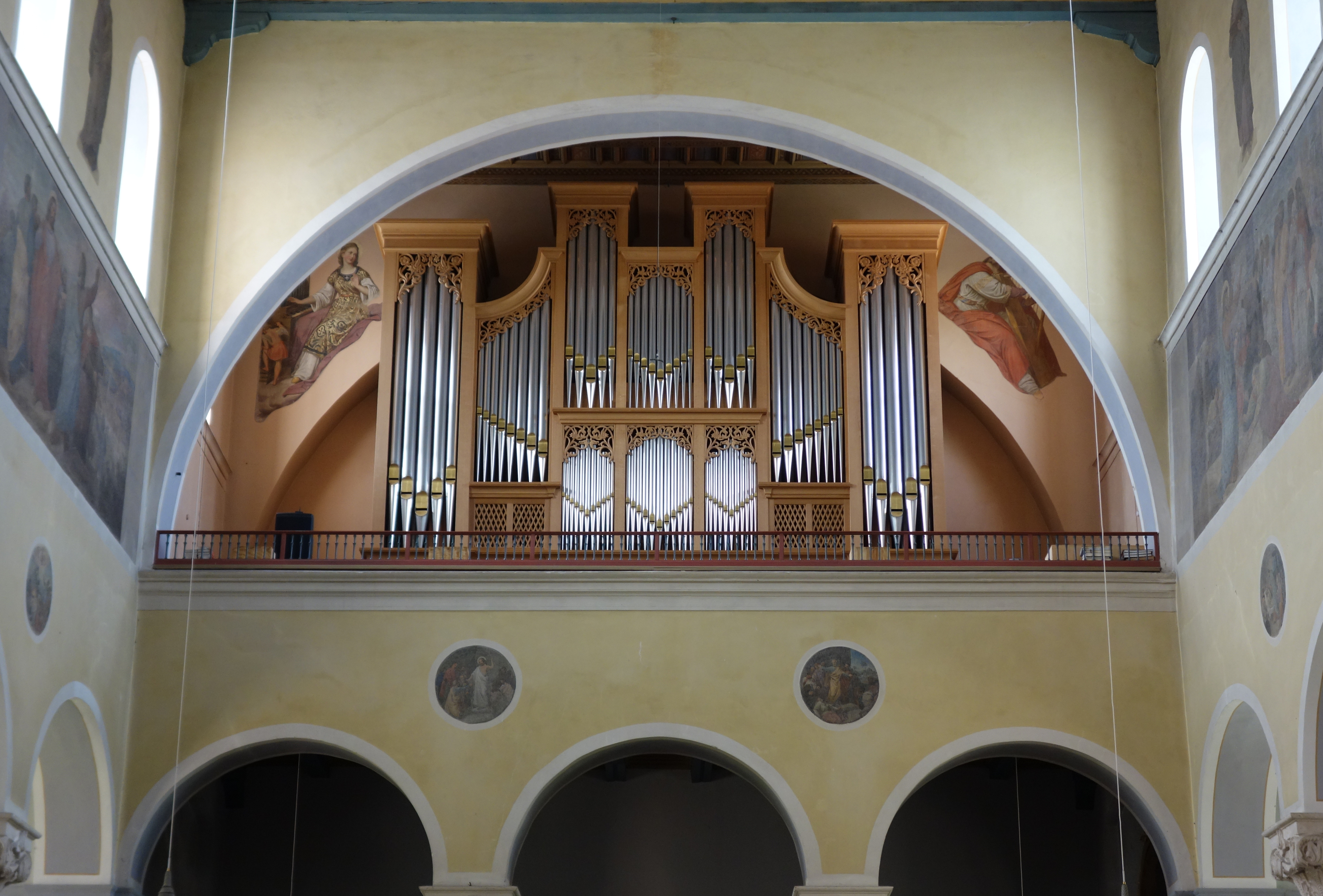 Orgel von St. Jakob in Friedberg (2001, Metzler Orgelbau, III/40)